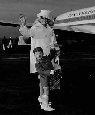 La actriz estadounidense Mamie Van Doren junto a su hijo Perry en Buenos Aires, Argentina, en 1960.